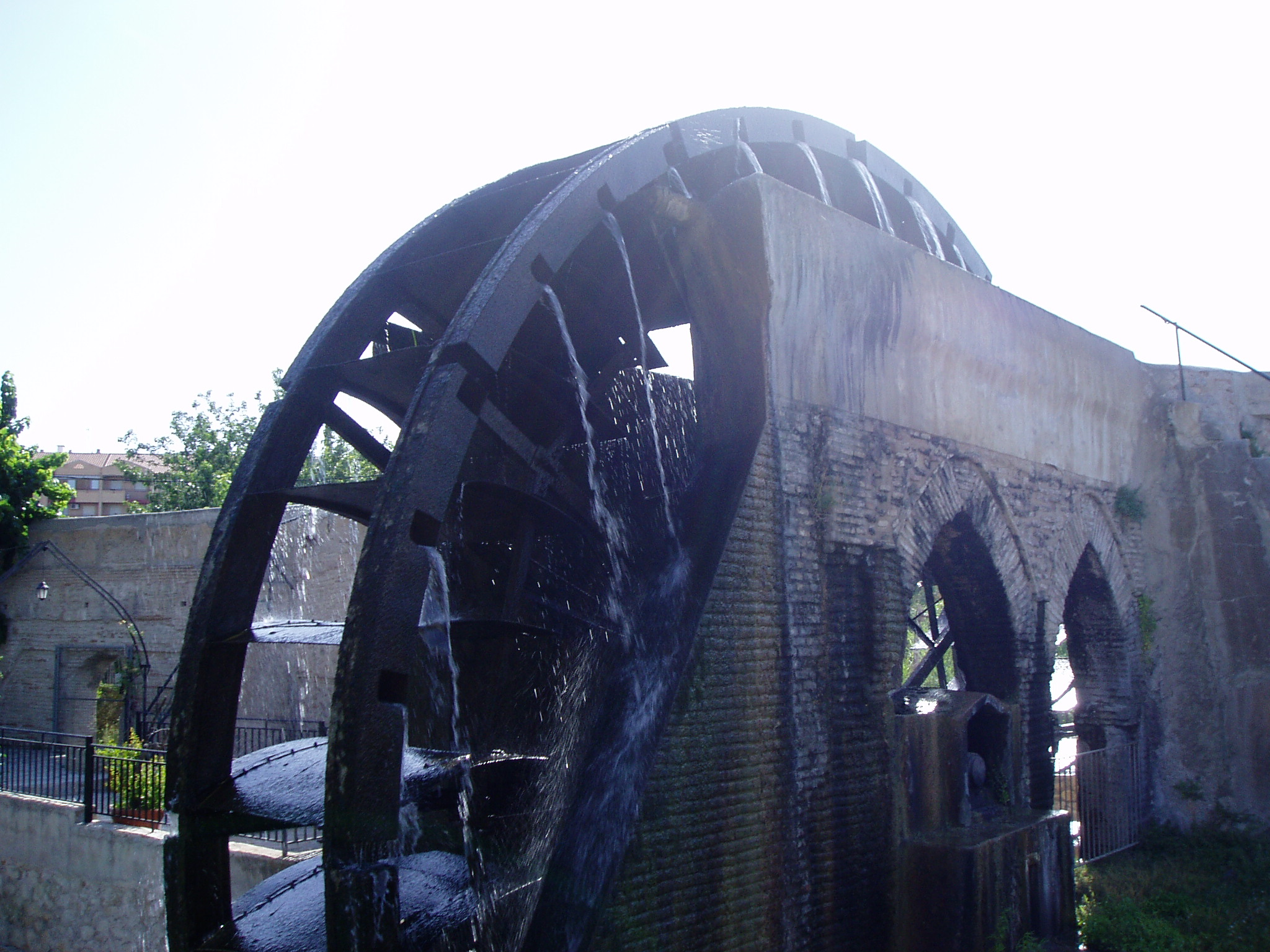 Ruedea de alcantarilla